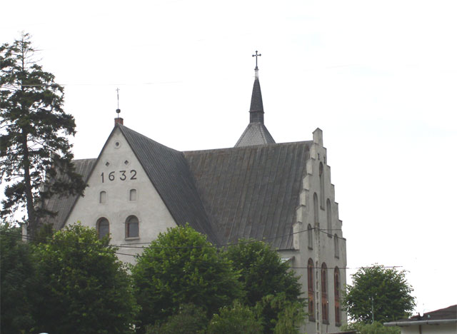 Kościół w Smołdzinie. Autor zdjęcia Cook, 2004 r. Udostępnione na licencji GNU FDL.